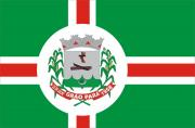 Drapeau de la municipalité de Grão-Pará - Brésil